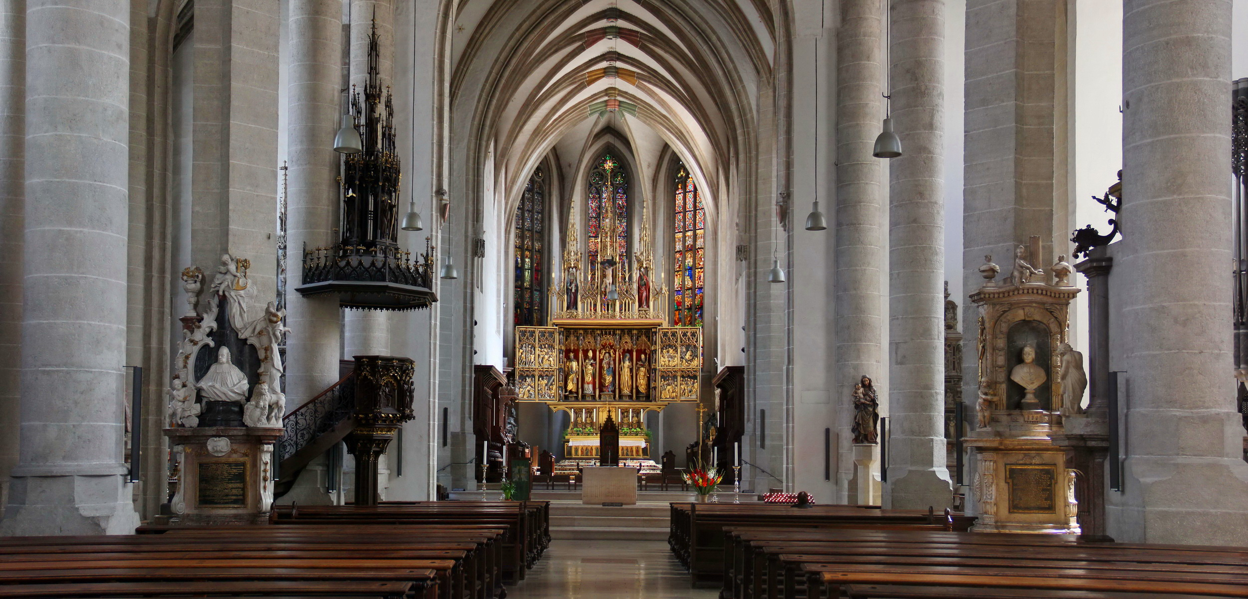 Eichstätt Cathedral Native nameDom zu EichstättLocationEichstätt, Upper Bavaria, GermanyCoordinates48° 53′ 30.86″ N, 11° 11′ 00.56″ E Authority control VIAF: 247706570 GND: 4218076-4